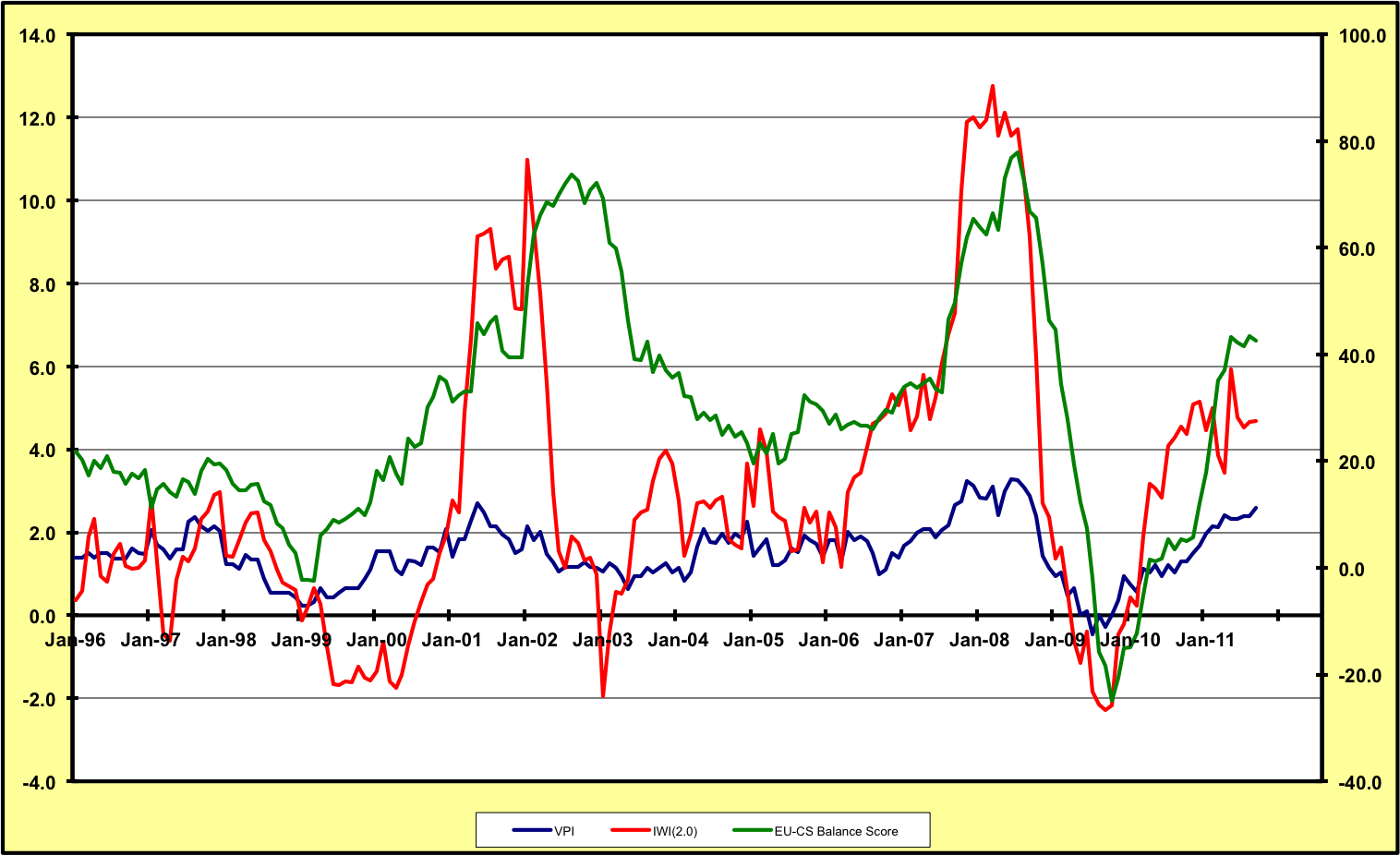 Sur l'axe gauche: Inflation perçue mesurée à l'aide de l'indice de l'inflation perçue et un coefficient d'aversion au risque de 2 (IWI(2)); Inflation officielle (Verbraucherpreisindex VPI) Sur l'axe droite: Inflation perçue mesurée sur la base de l'enquête Balance-Score de Union européenne